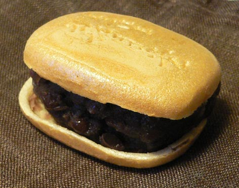 Monaka（喜最中）